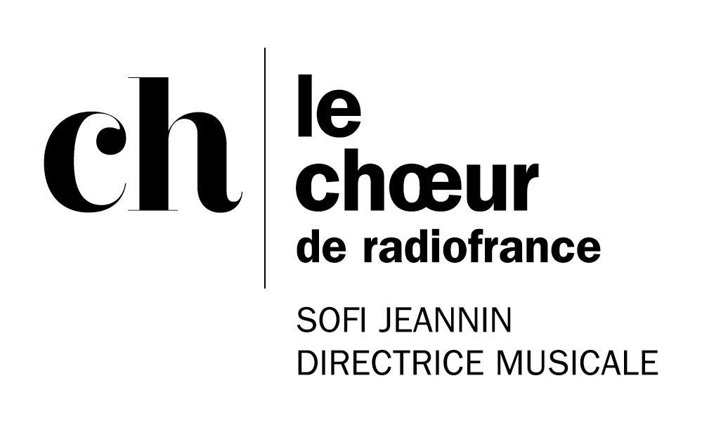 Logo Choeur de Radio France